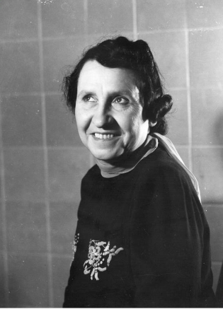 Elżbieta Korfanty